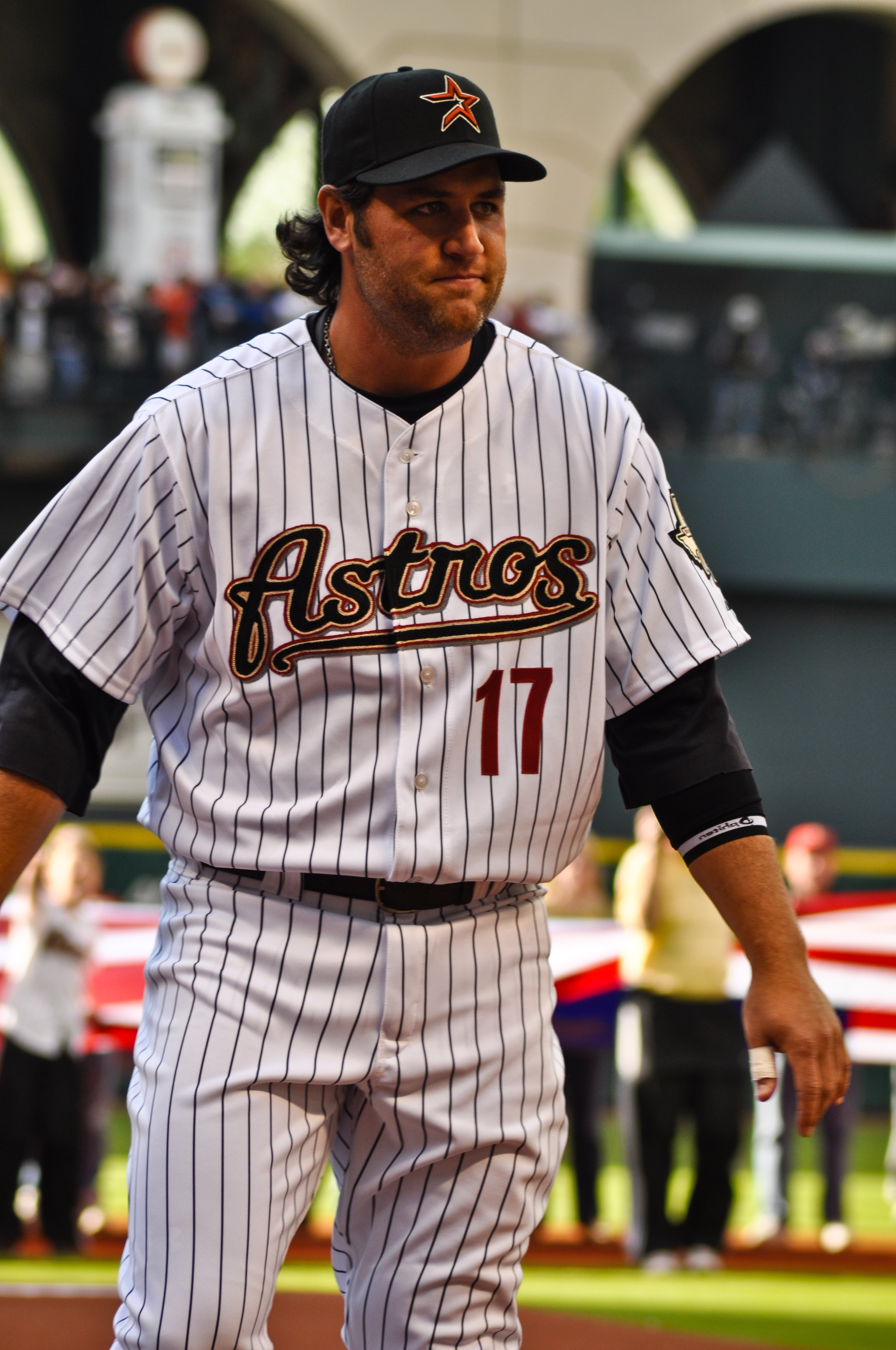 Lance Berkman